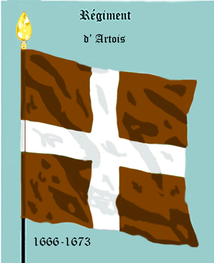 Ordonnanzfahne eines königlich französischen Infanterie-Regiments. - Entnommen und überarbeitet aus: „LES UNIFORMES ET LES DRAPEAUX DE L'ARMÉE DU ROI“ Marseille 1899. (Drapeau d'Ordonnance d' un régiment française d'infanterie royale.)